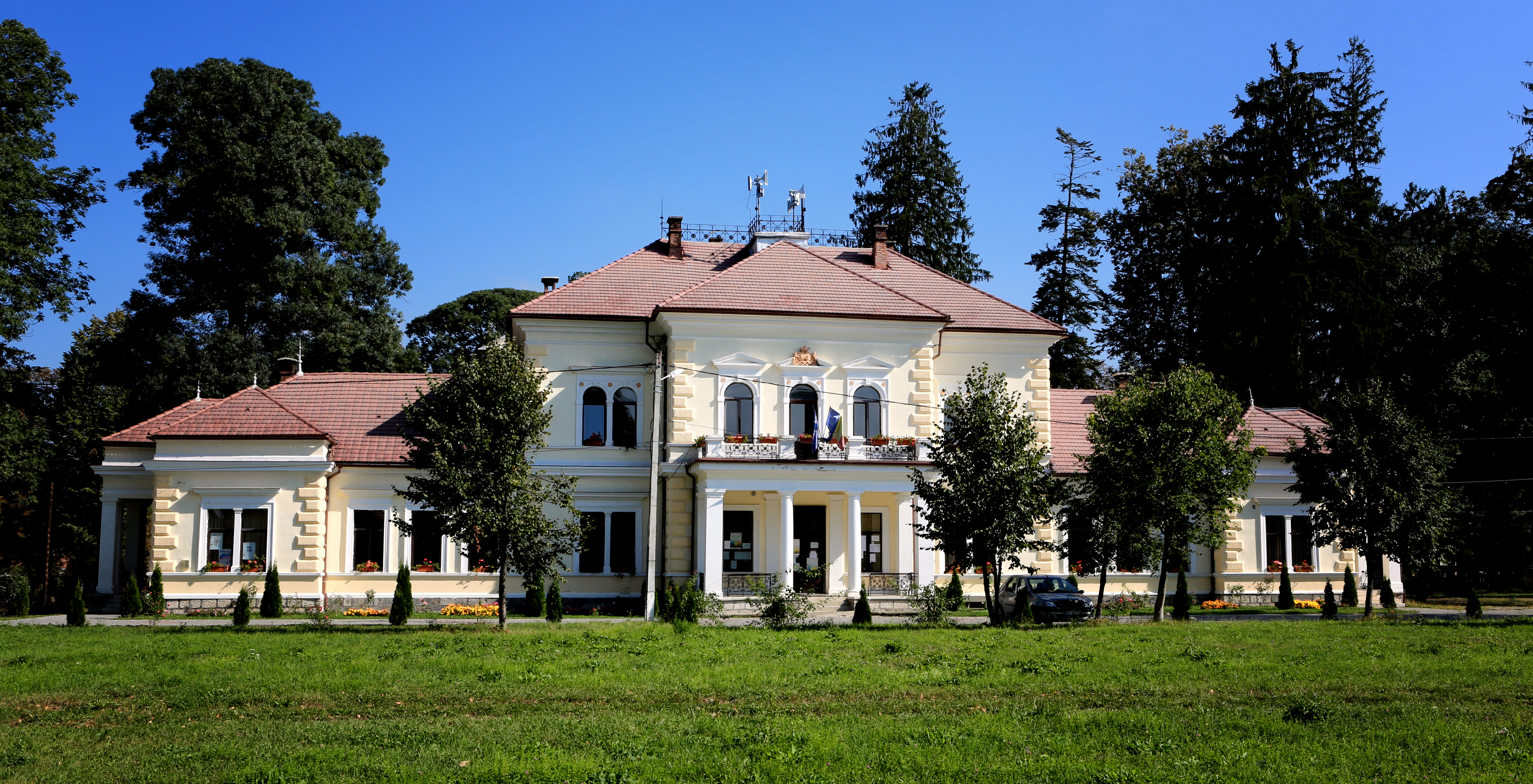 Castelul Beldy Ladislau, azi primărie 01